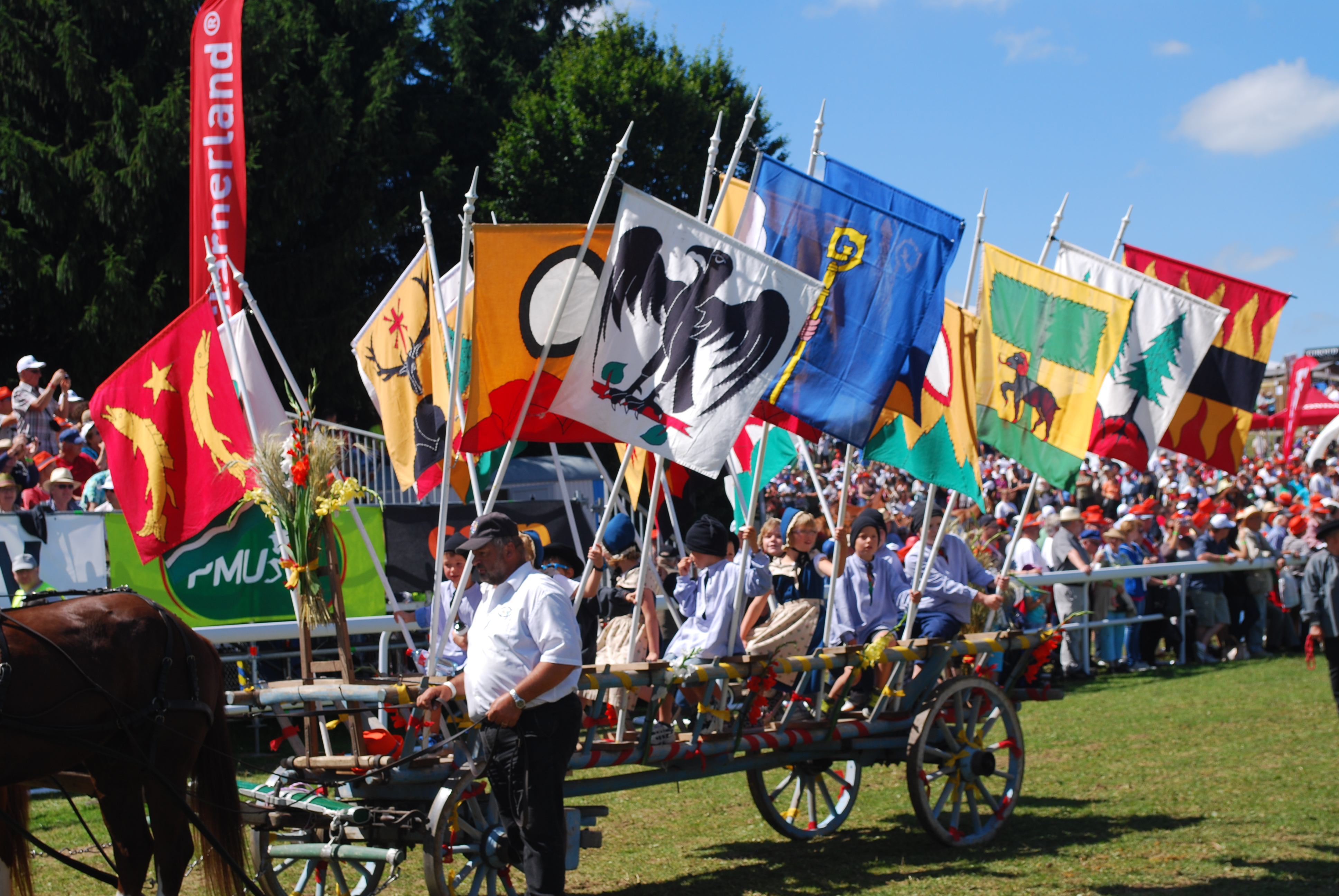 Ein Wagen am Umzug des Marché-Concours präsentiert die Wappen der Gemeinden des Bezirks Franches-Montagnes